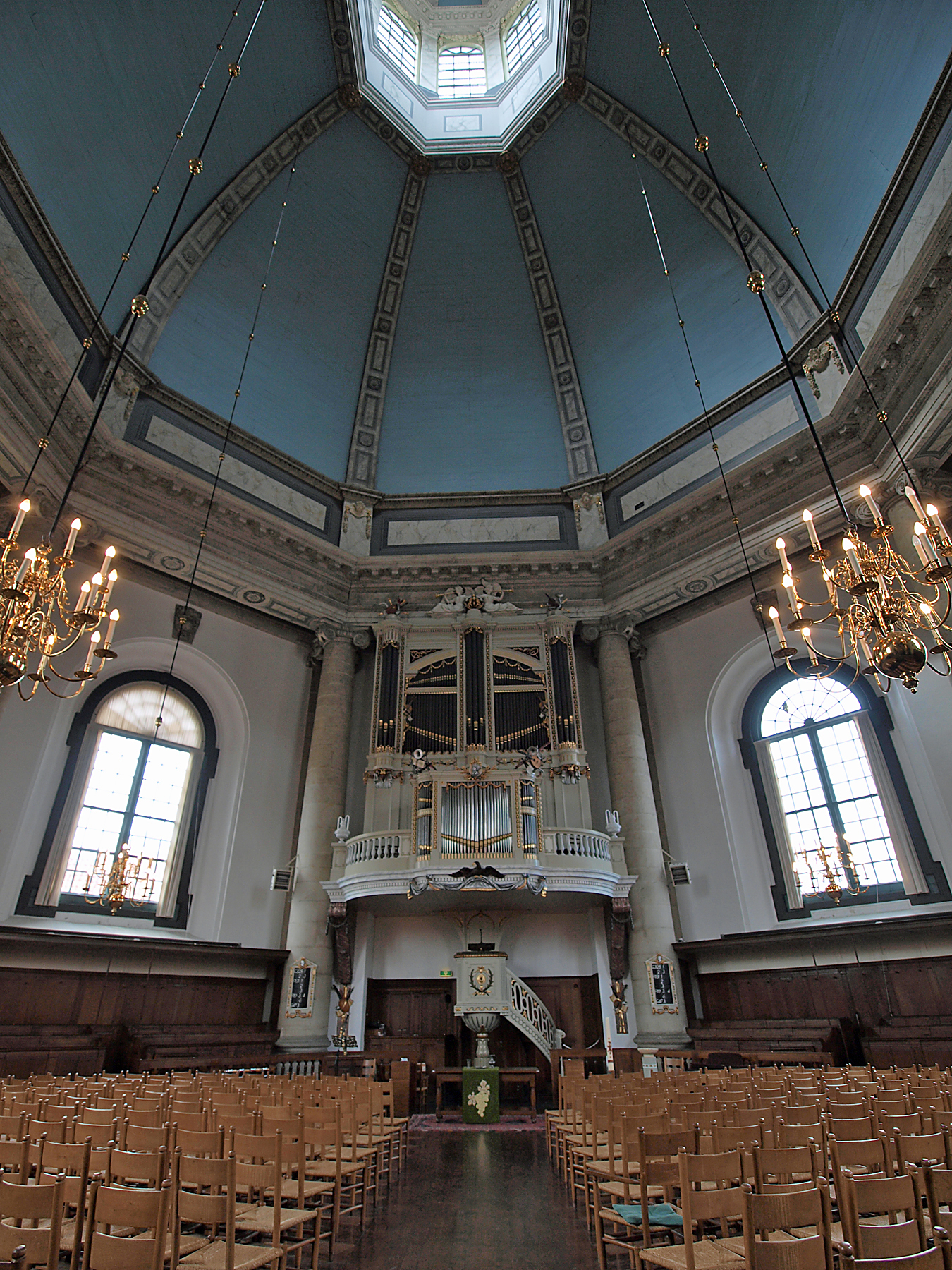 interieur Oostkerk Middelburg